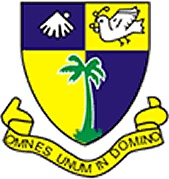 Igbobi College Emblem